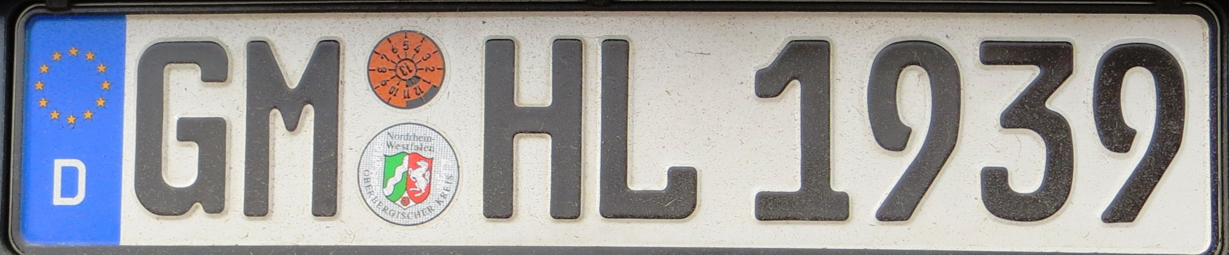 Oberbergischer Kreis license kentekenplaat Noordrijn-Westfalen